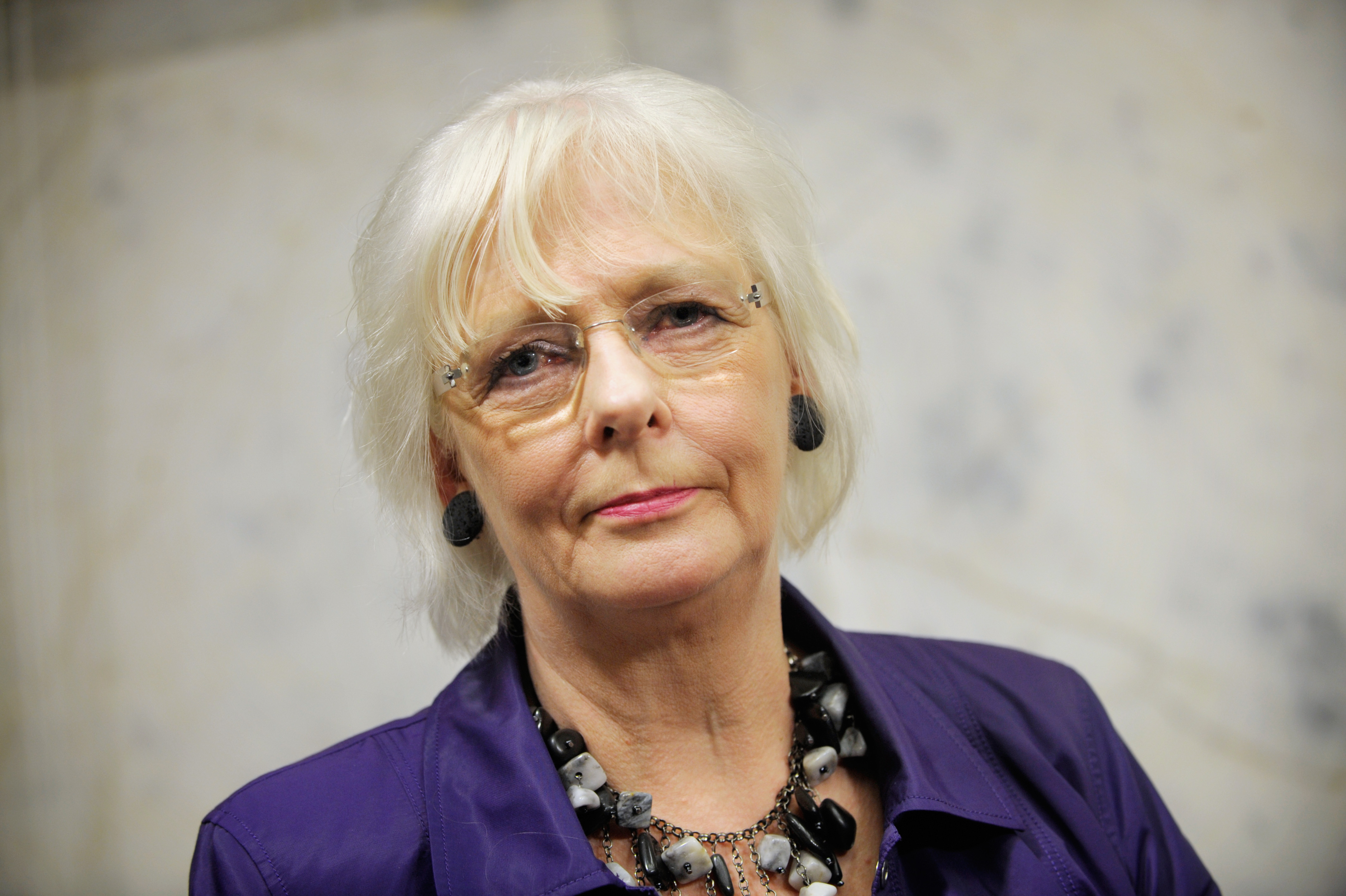 Islands statsminister Jóhanna Sigurðardóttir vid pressmöte under Nordiska rådets session i Stockholm 2009